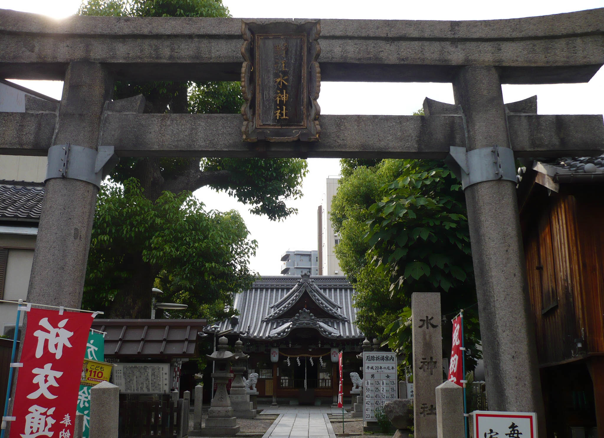 野江水神社